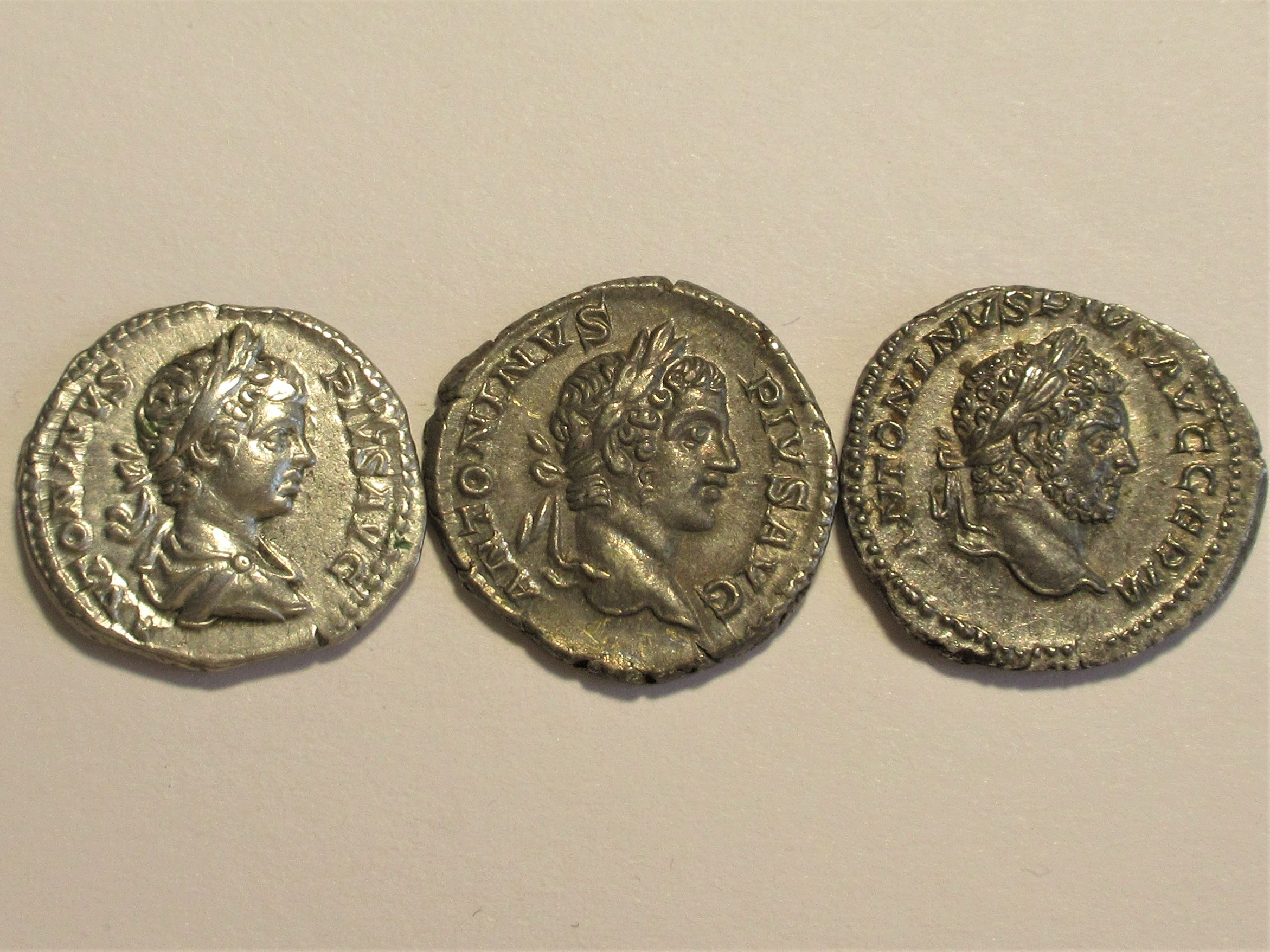 Entwicklung der Porträts des Caracalla auf Münzen: Kind, Jugendlicher, mann mit Bart